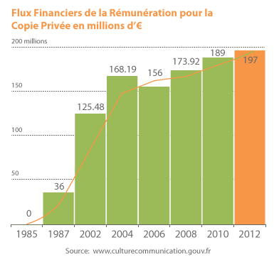 Flux Financiers de la Rémunération pour la Copie Privée en millions d’€